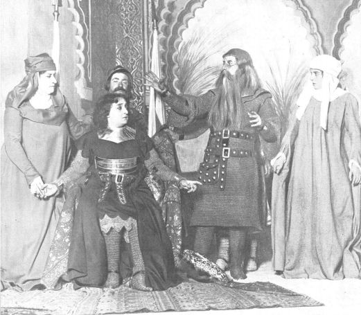 Escena del estreno de la Obra de teatro Las hijas del Cid, de Eduardo Marquina en 1908. De izquierda a derecha, María Cancio, María Guerrero, Fernando Díaz de Mendoza y Catalina Bárcena.